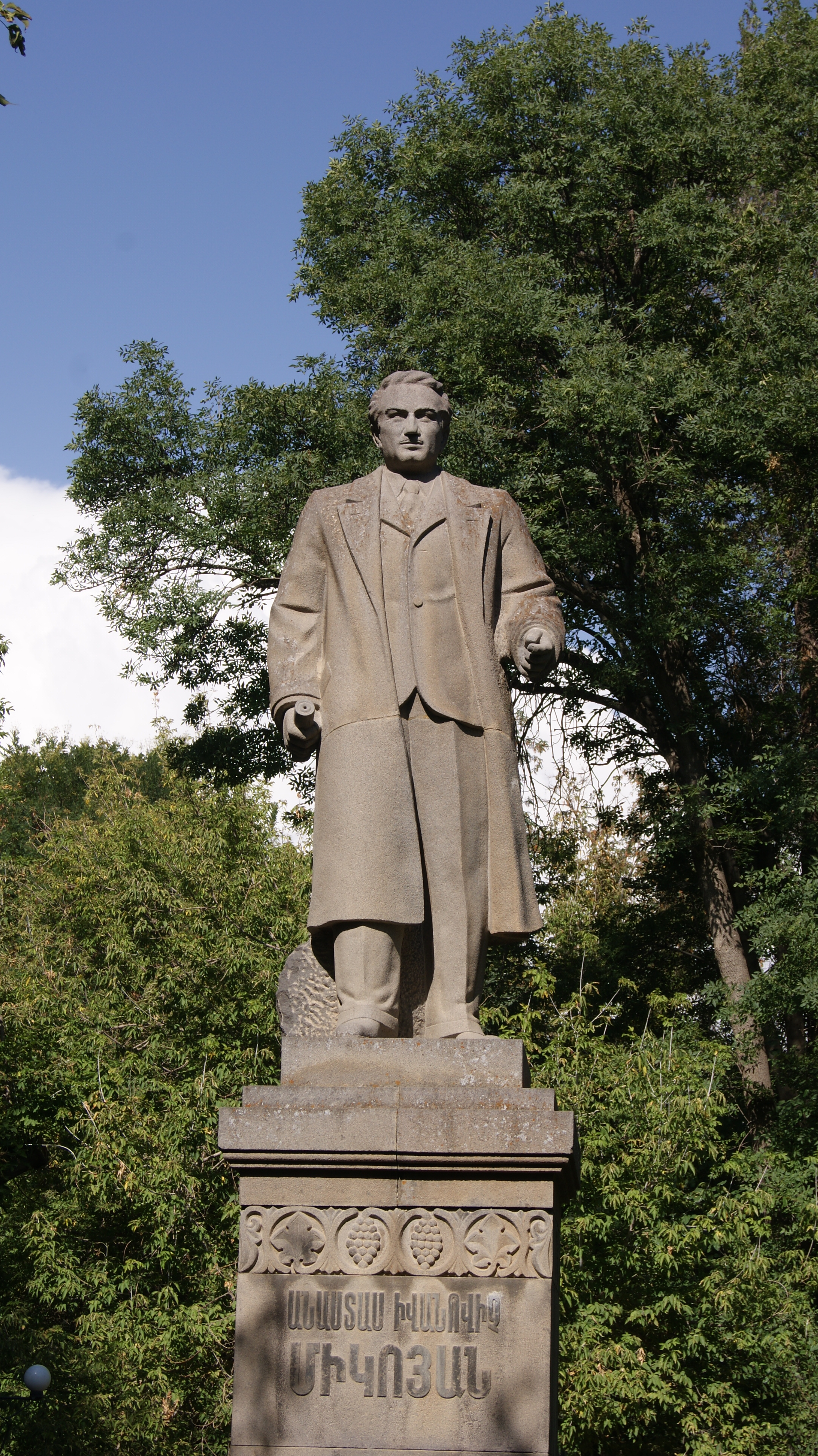 Հուշարձան Անաստաս Միկոյանի, Եղեգնաձոր 1/12